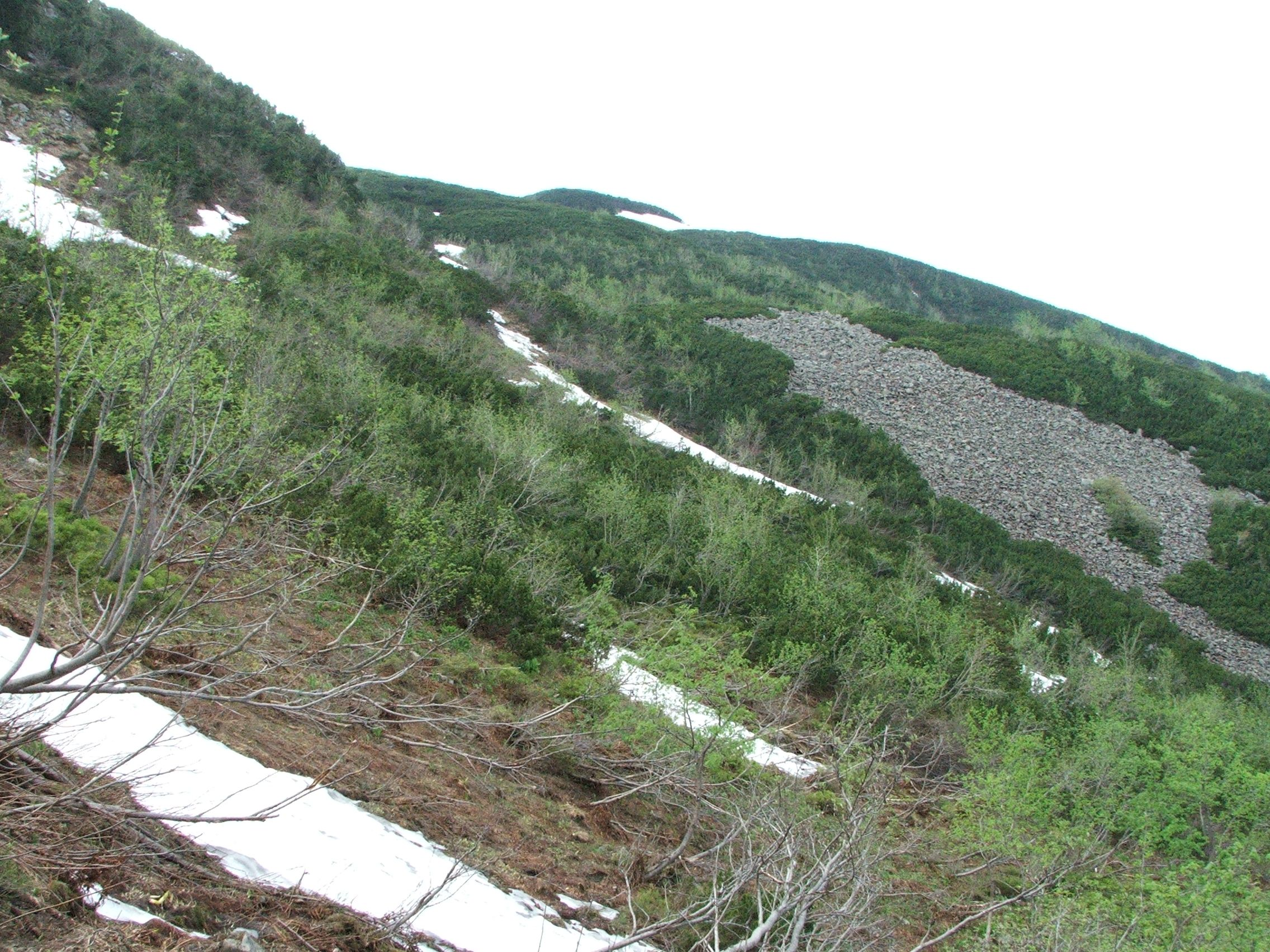 Babia Góra